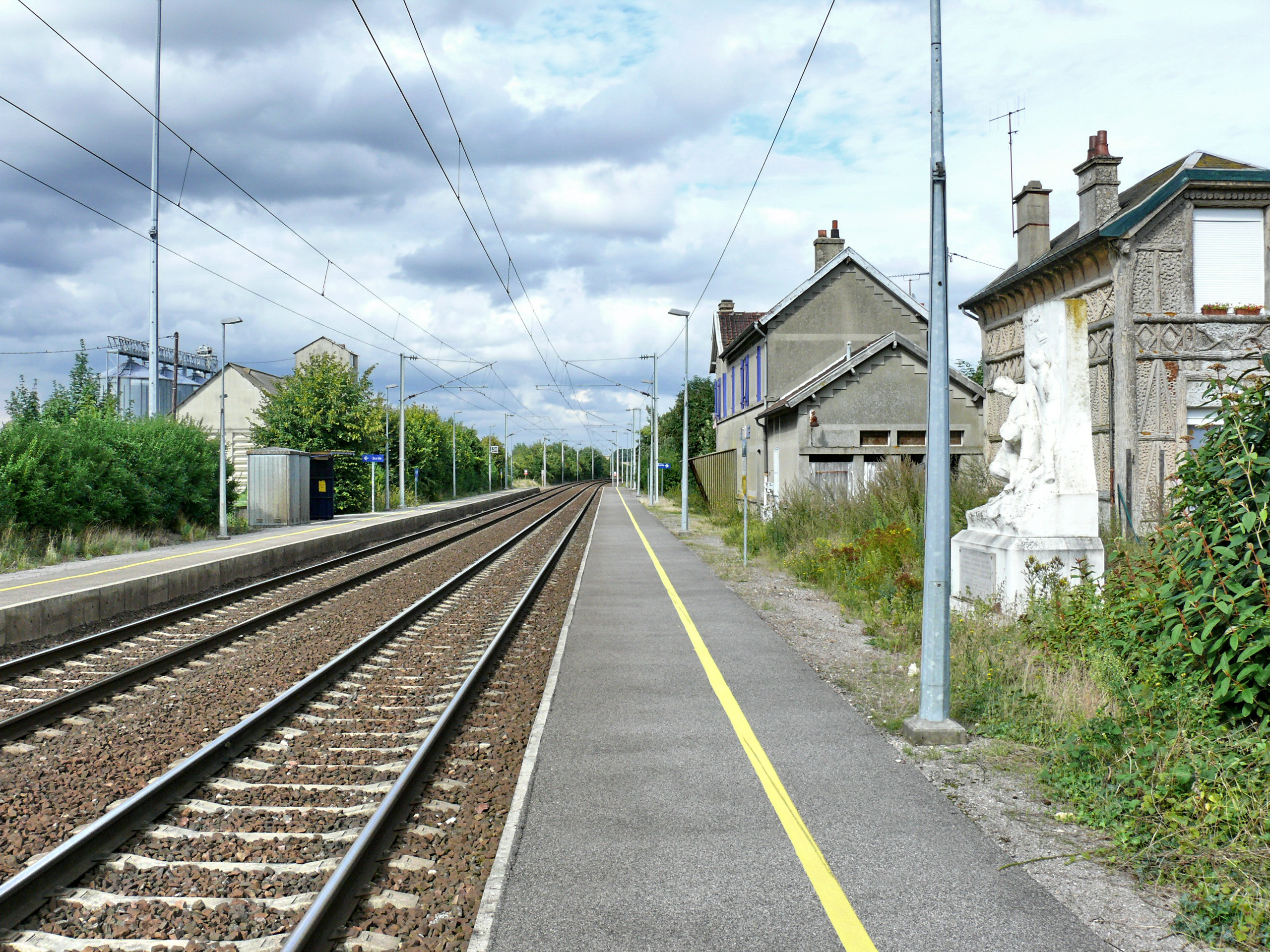 Vue générale de la Gare de La Faloise (Somme - Picardie - France)